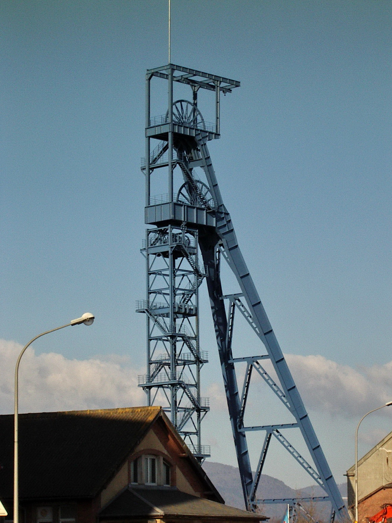 Vestiges des mines de potasse d'Alsace : le carreau Théodore à Wittenheim, Haut-Rhin, Alsace, France. Le chevalement a une hauteur de 64 m et il est classé "monument historique" depuis le 17 août 1995